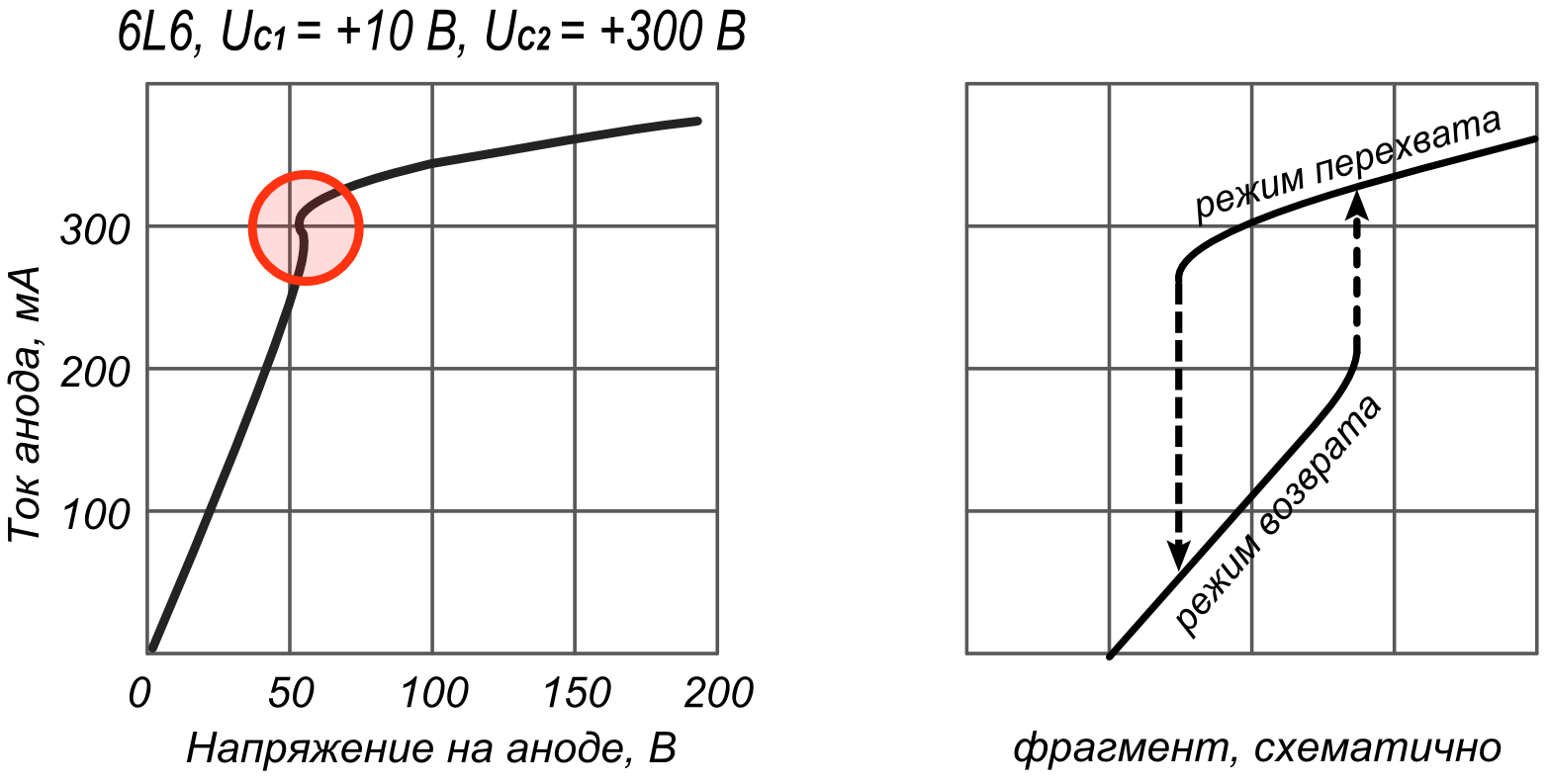 ВАХ лучевого тетрода 6L6. Явление гистерезиса при "соскоке" поля в зоне перехода из режима перехвата в режим возврата и обратно.